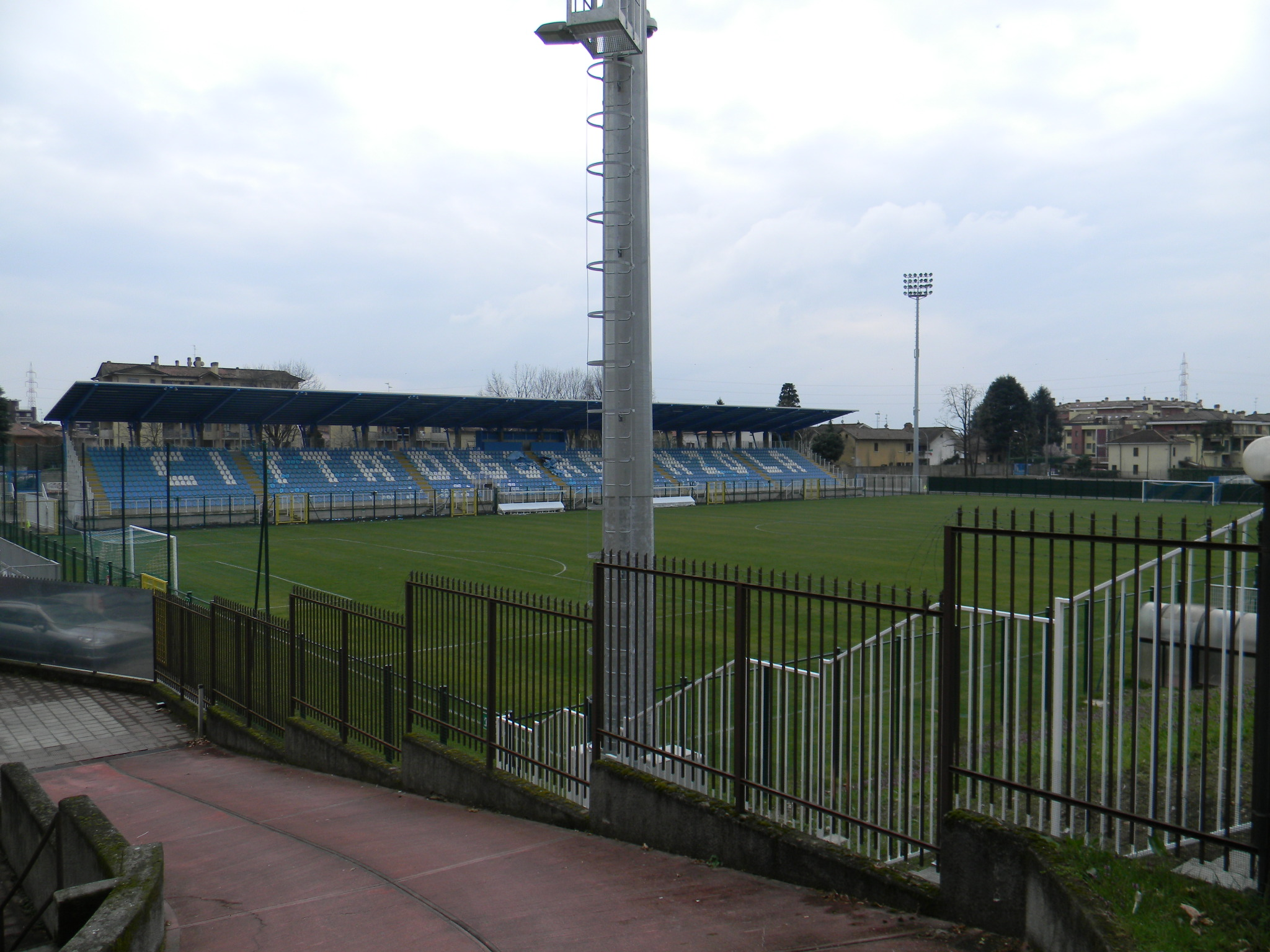 Interno dello stadio comunale di Gorgonzola (MI) - vista sulla tribuna sud